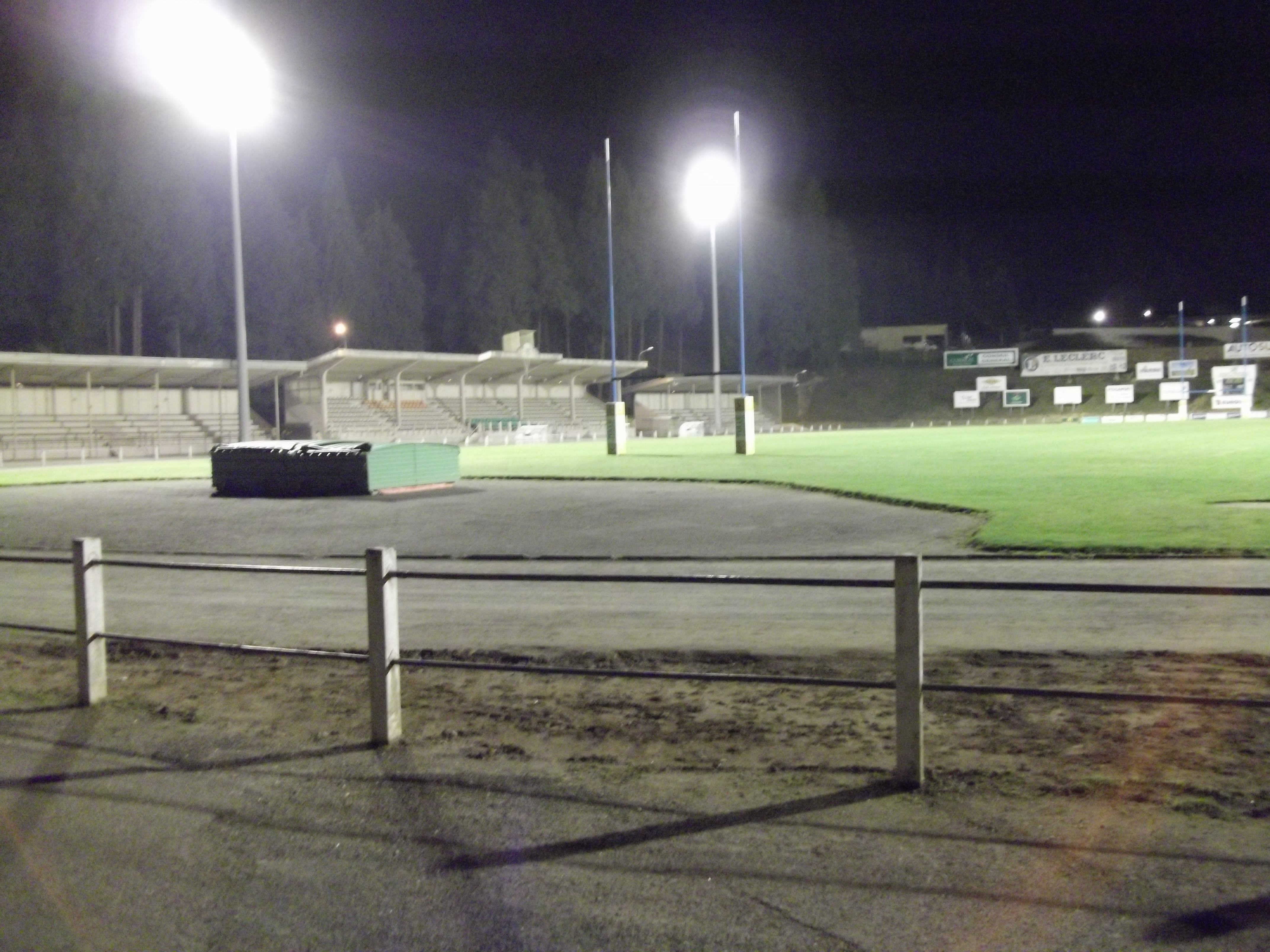 Le Stade Alexandre Cueille